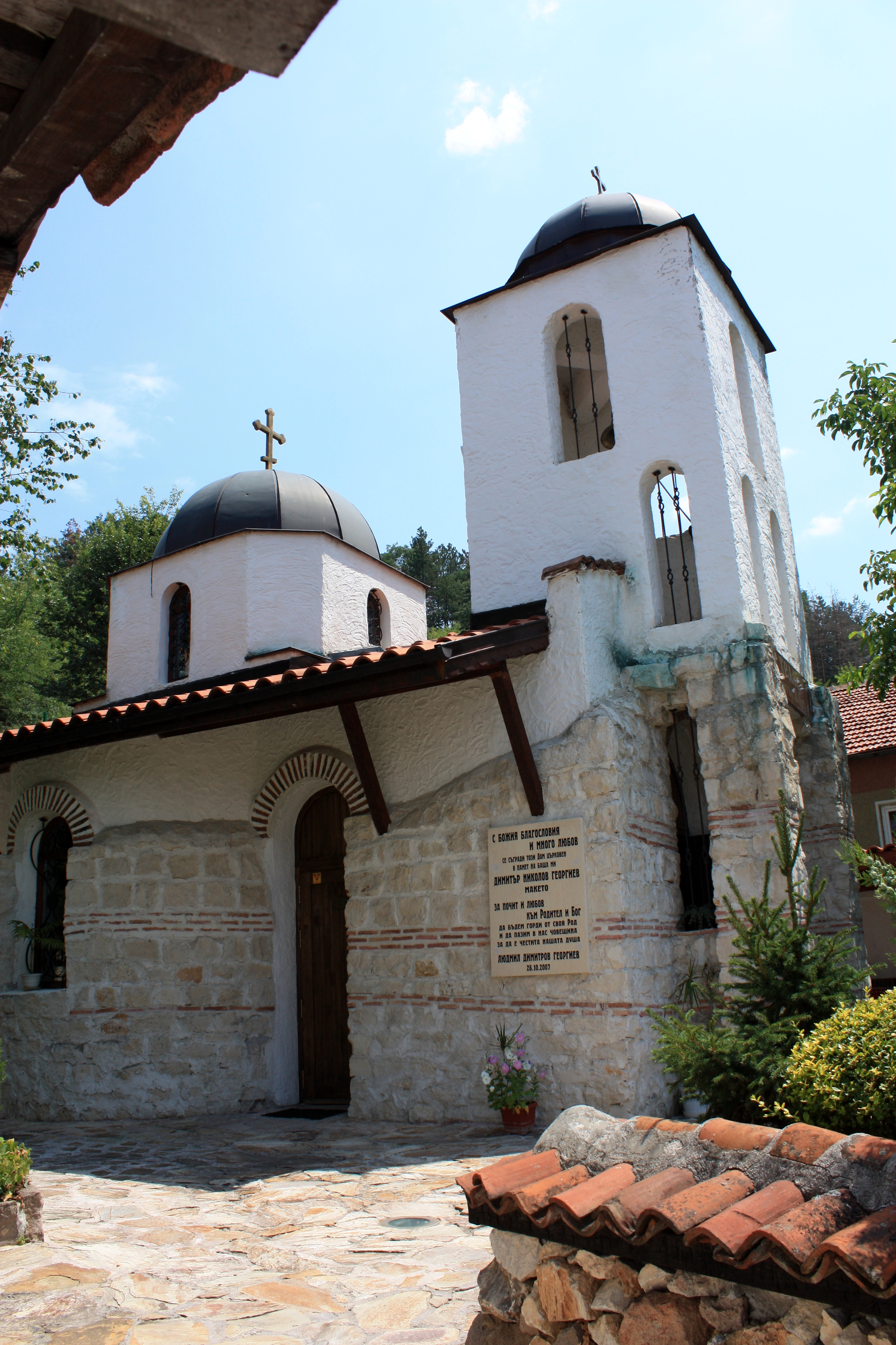 Kirche Hl. Demetrios in Debraschtiza, Bulgarien.